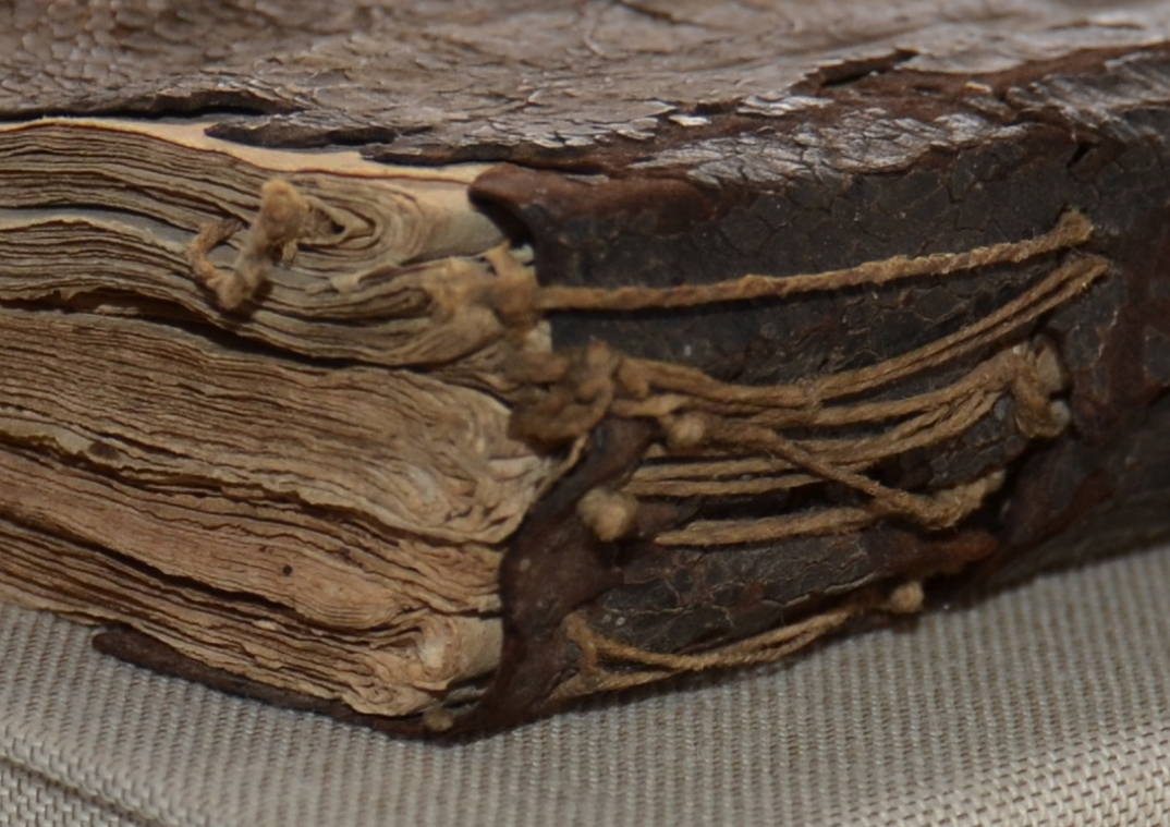 Darstellung von Lagen im Gemeindebuch Schrebitz.